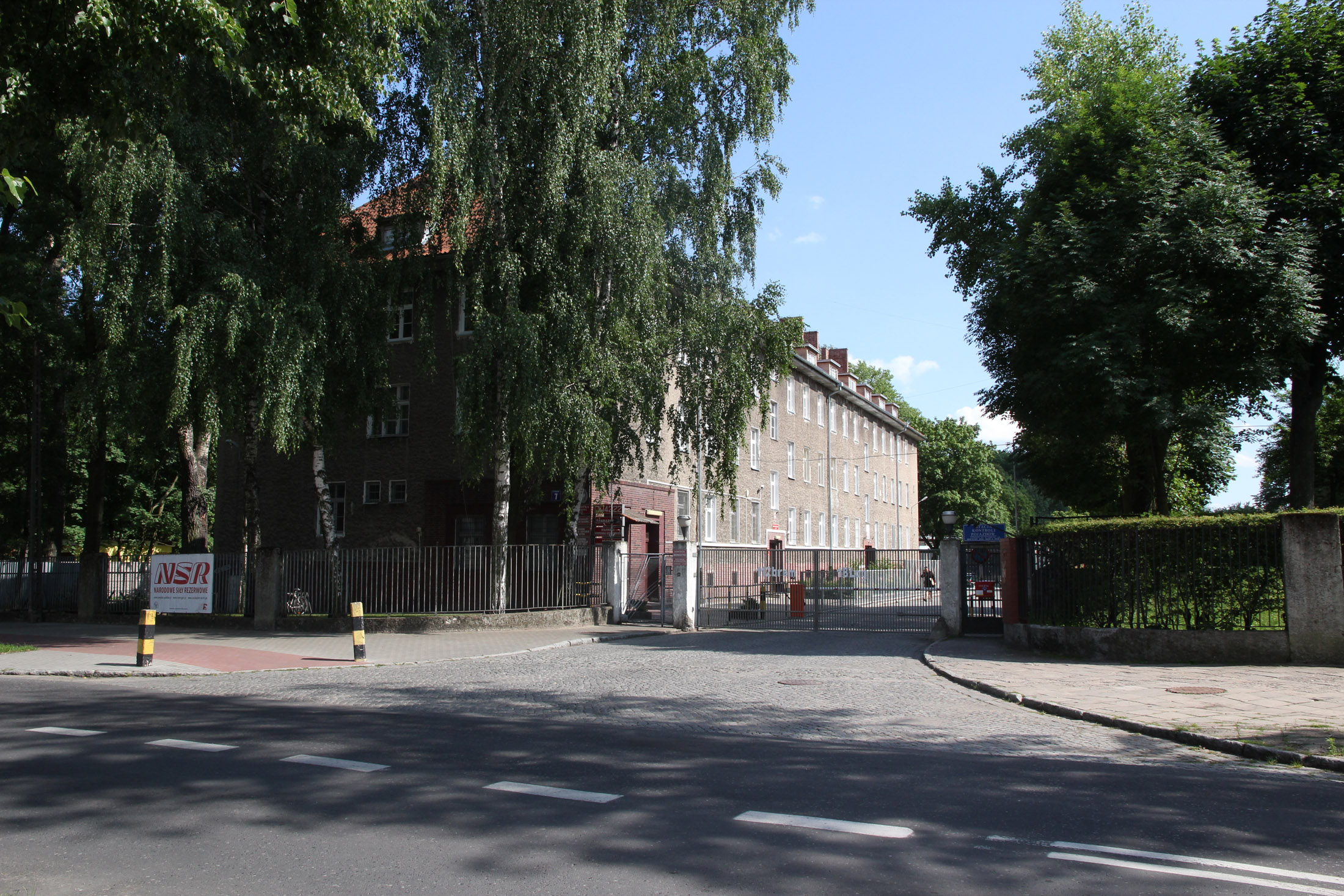 Budynek koszarowy w Giżycku